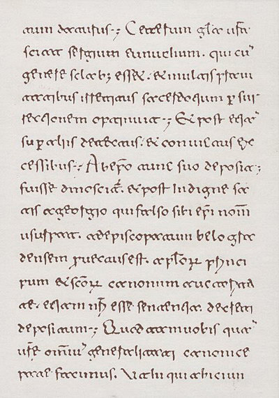 Српски (ћирилица): Словенско име Београд у писму Папе Јована VIII бугарском кнезу Борису, у Архиву Ватикана, Archivio Segreto Vaticano, Registro Vaticano, I, ff. 30-42